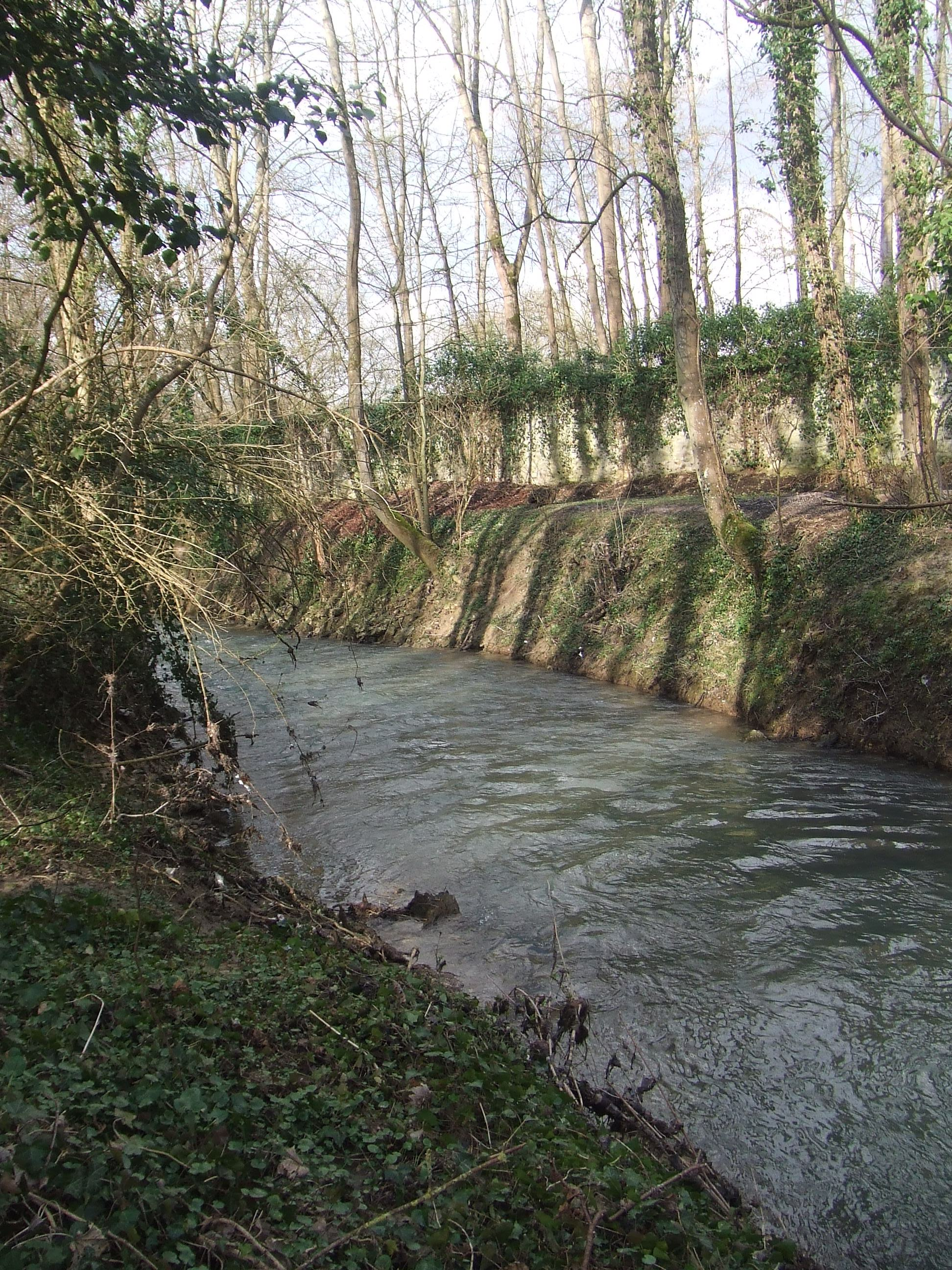 Bords du Morin